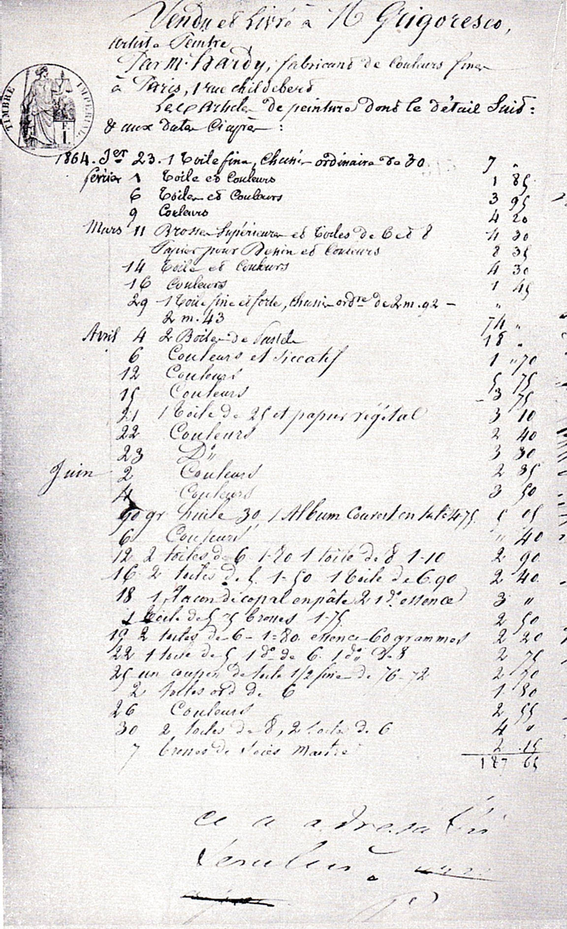 Notă de plată a negustorului Hardy pentru culorile și pânzele vândute lui Nicolae Grigorescu în ani 1864-1865.